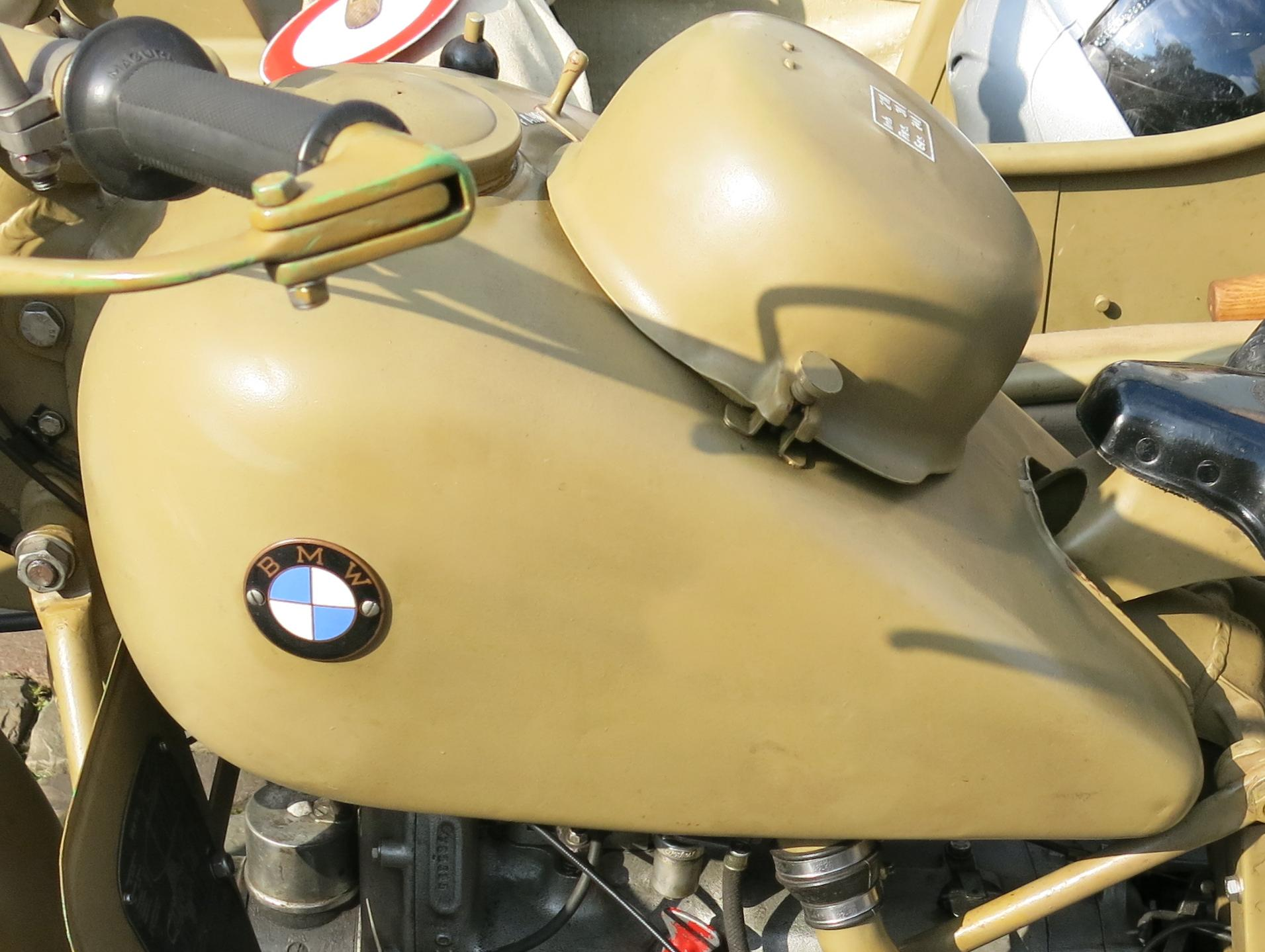 BMW R 75 Gespann, Luftfilter auf dem Tank